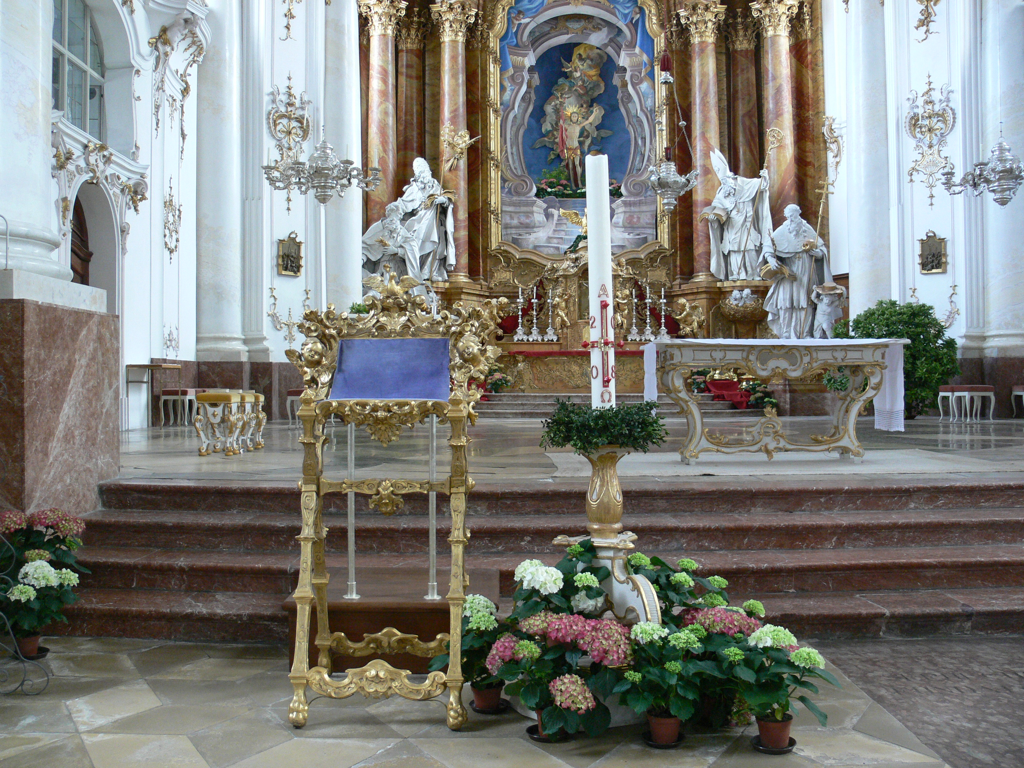 Marienmünster Dießen (ehem. Augustiner-Chorherren-Kirche Mariä Himmelfahrt, heute Pfarrkirche, Dießen am Ammersee) Lesepult und Osterleuchter vor dem Hochaltar